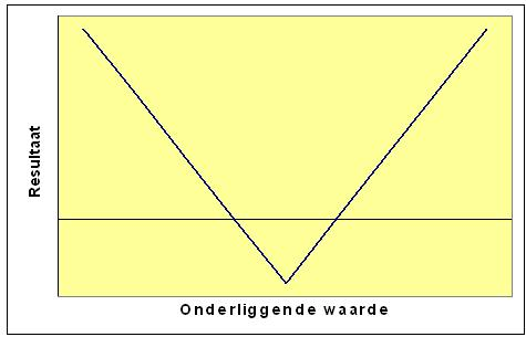 straddle option strategy